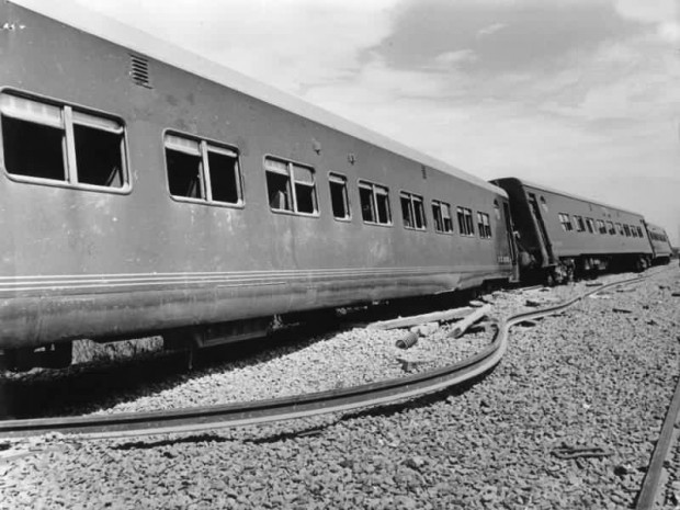 Choque de El Luciernaga, en Brandsen. Año 1981.